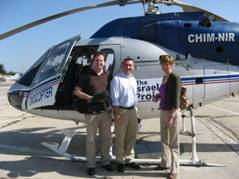 Intellicopter